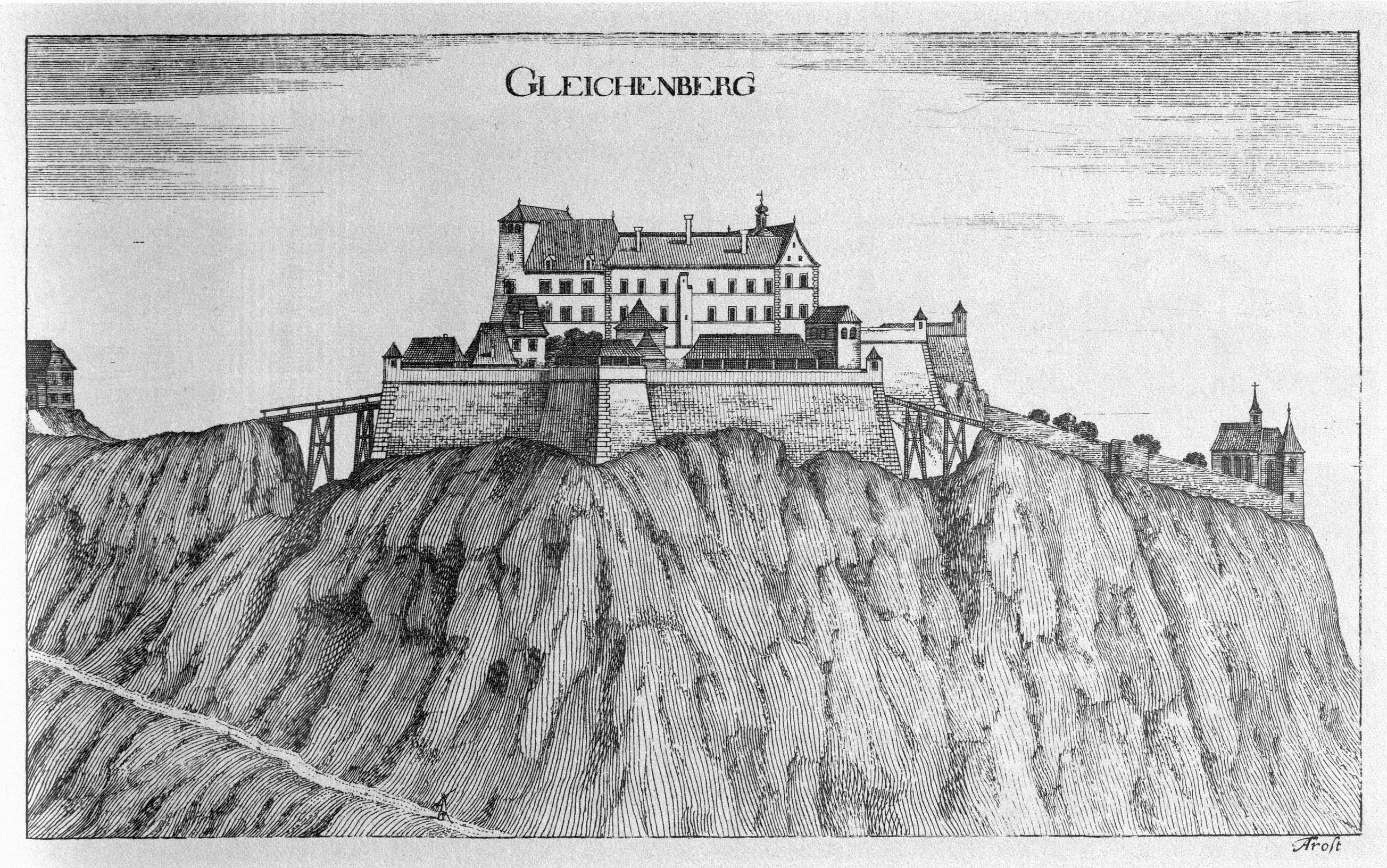 G. M. Vischers Käyserlichen Geographi, Topographia Ducatus Stiriae, Das ist: Eigentliche Delineation / und Abbildung aller Städte / Schlösser / Marcktfleck / Lustgärten / Probsteyen / Stiffter / Clöster und Kirchen / so es sich im Herzogthumb Steyrmarck befinden; Und anjetzo Umb einen billichen Preyß zu finden seynd Bey Johann Bitsch Universitäts Buchhandlern / Auff dem Juden=Platz bey der guldenen Saulen. Graz 1681 Die Nummerierung der Dateien folgt der alphabetischen Reihung der Ortsnamen